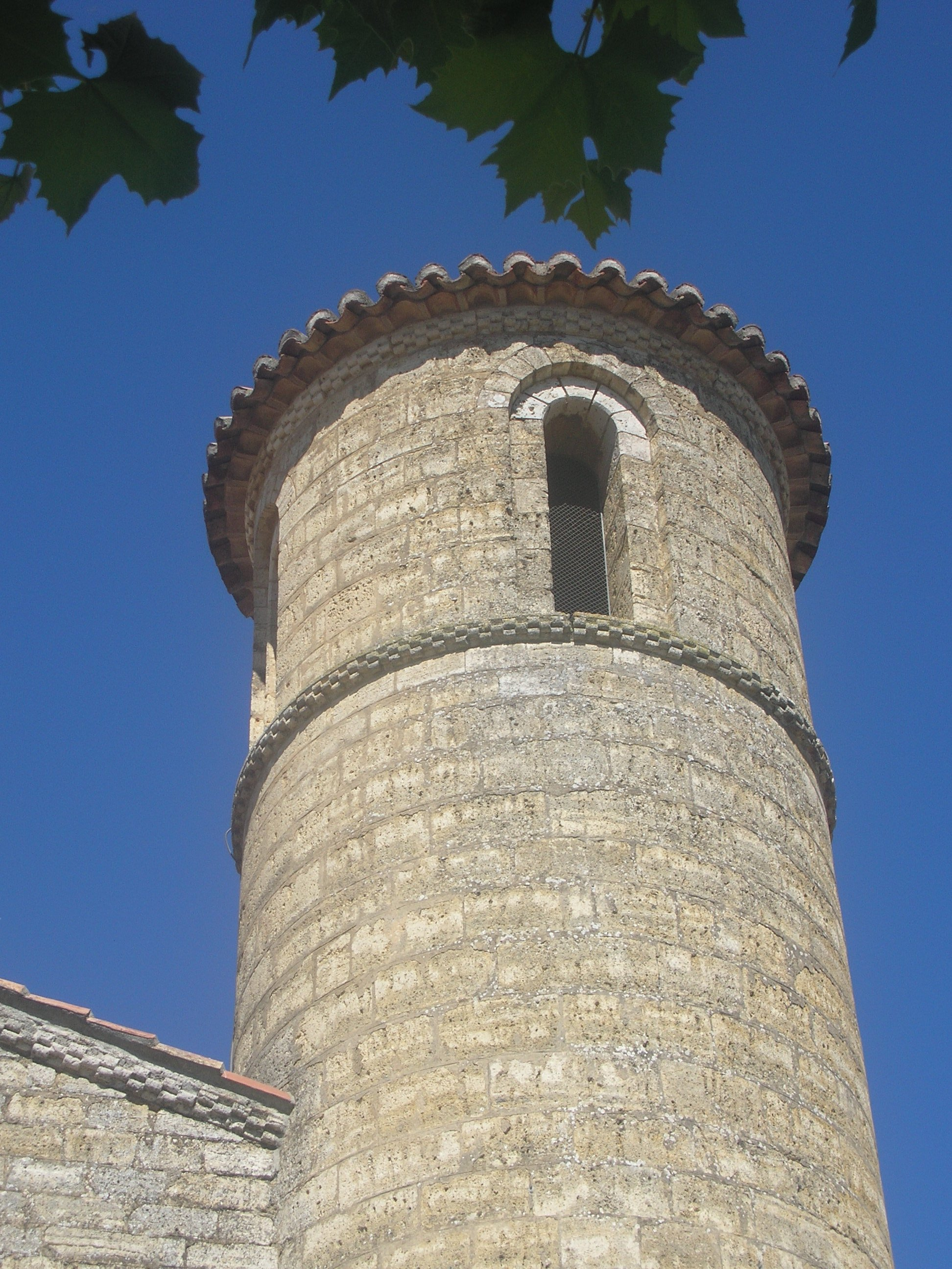 Se aprecia perfectamente el jaqueado en la torre y muro de la iglesia de San Martín de Frómista.